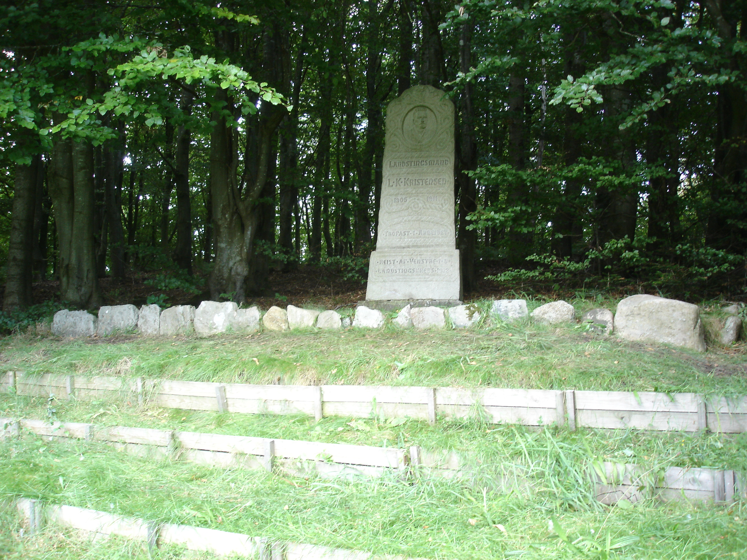 Anlæg ved Ashøje med relief af Laust Kristensen, udført af Elias Ølsgaard